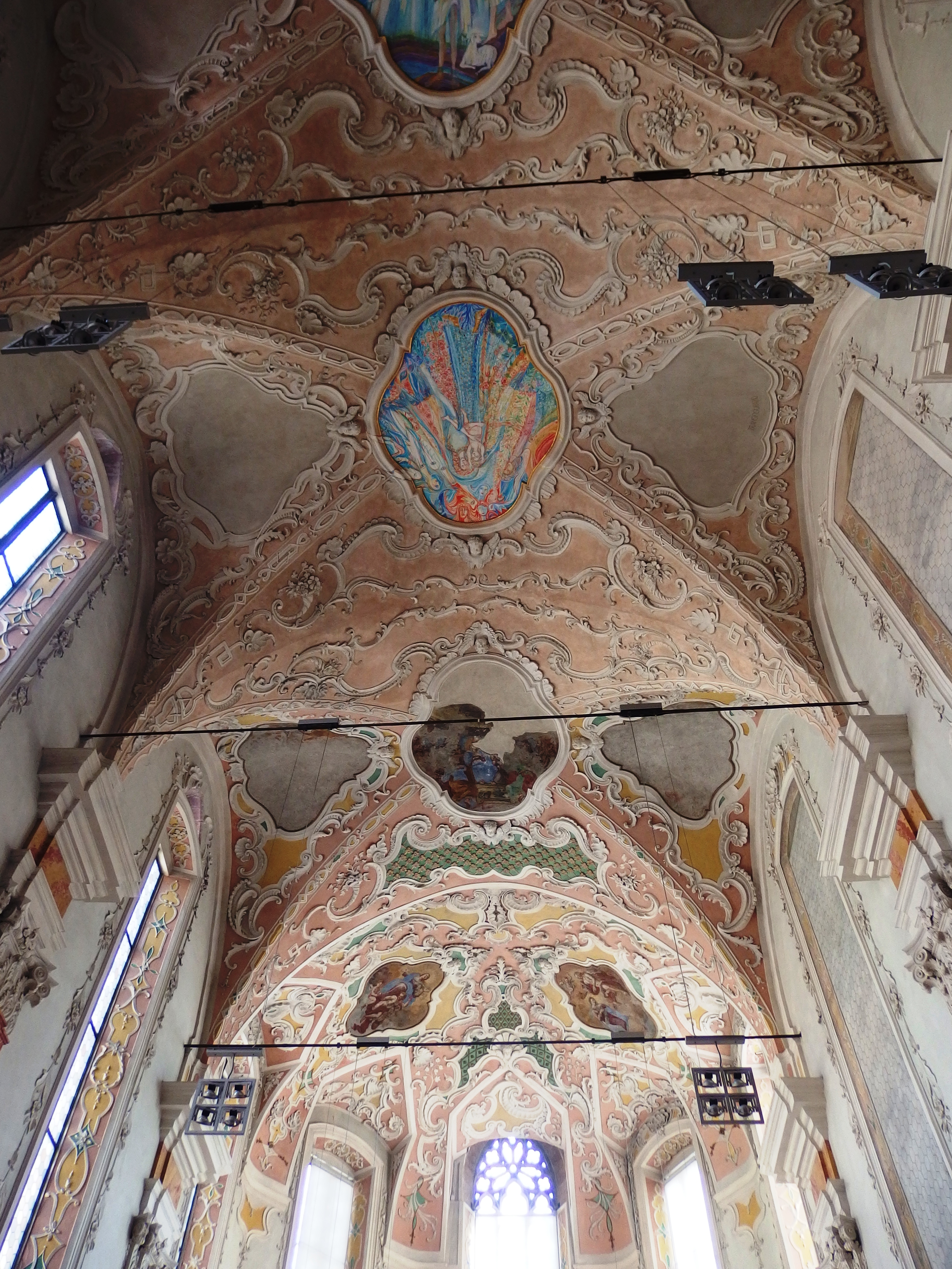 Bozen, Südtirol. Dominikanerkirche